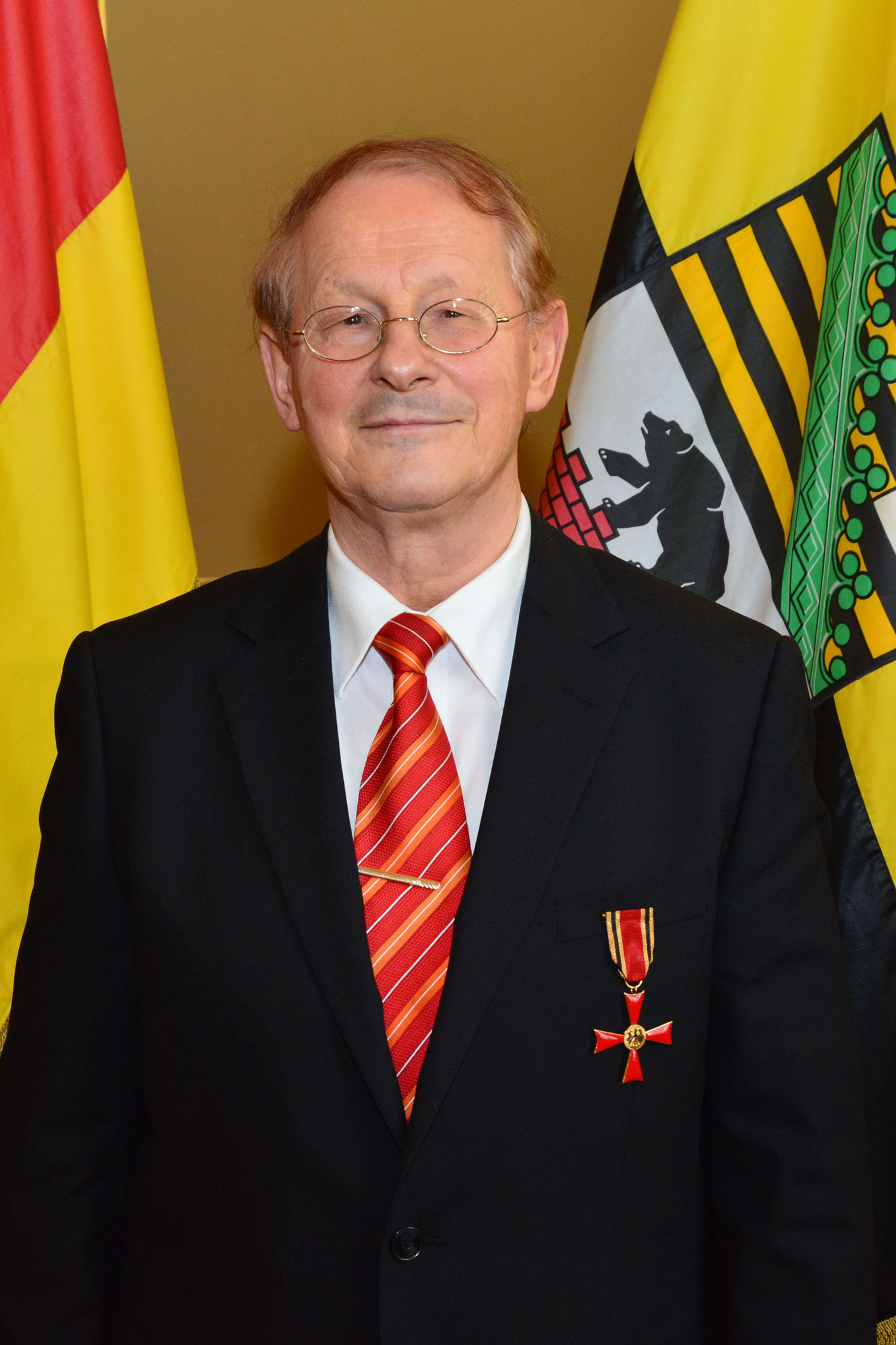 Bernd Hoppe Portrait